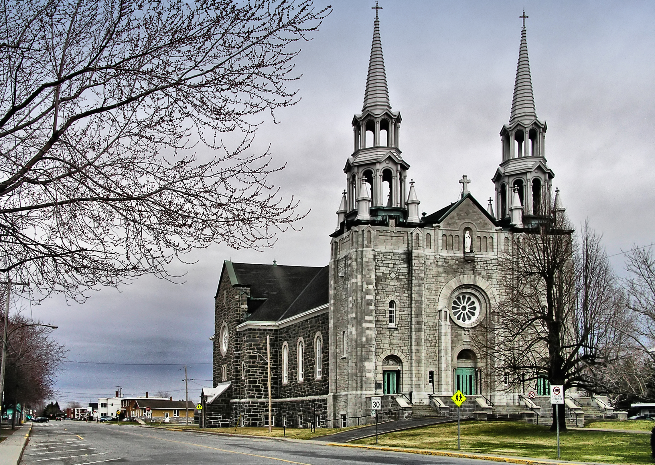 Marieville (Québec) - Centre-ville avec l'église Saint Nom de Marie